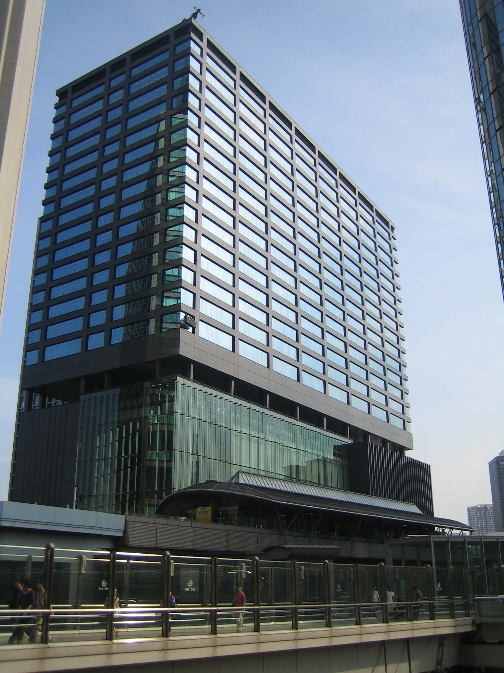 Shiodome Sumitomo Building